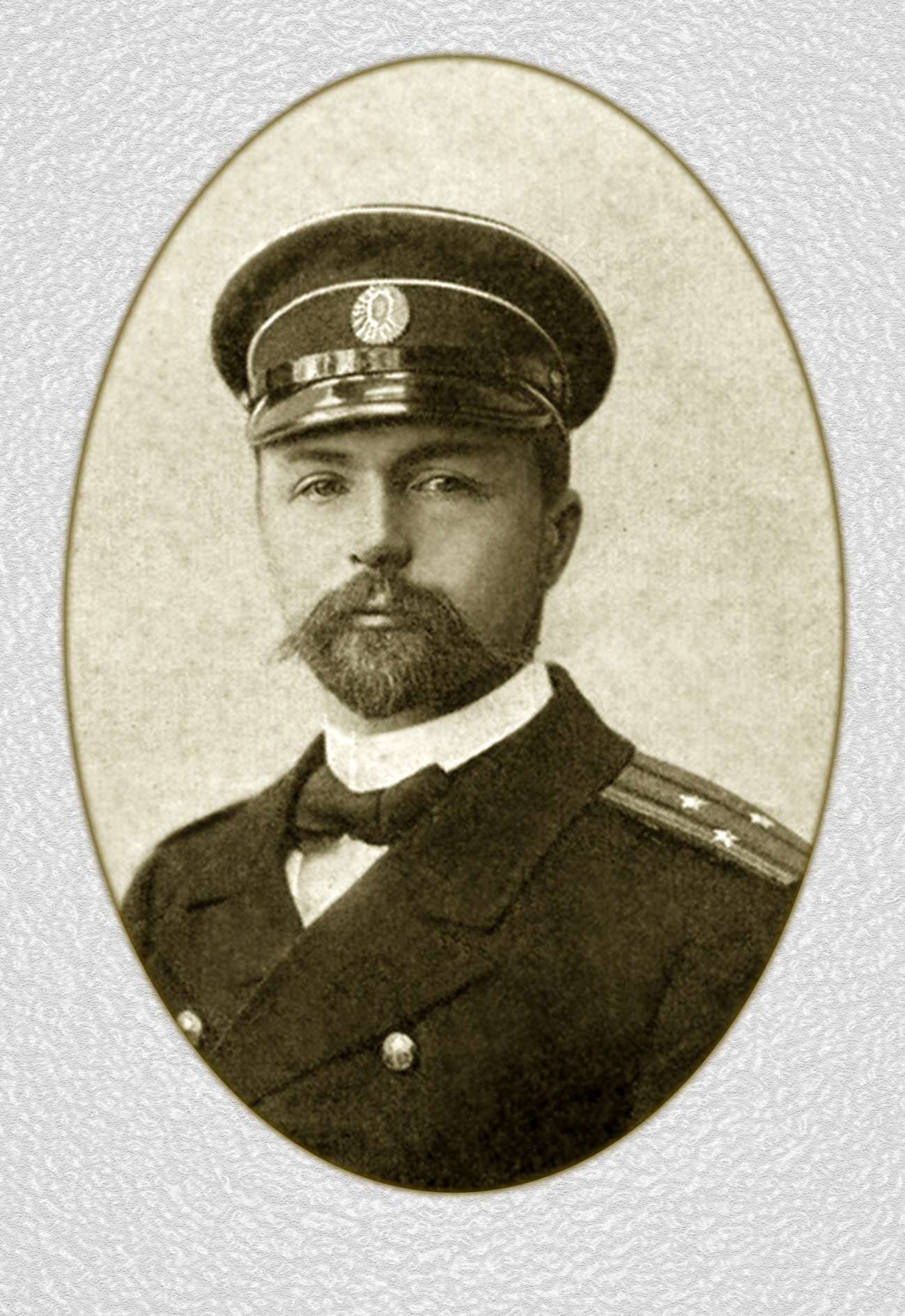 Капитан 2-го ранга Васильев Михаил Петрович. Первый командир ледокола "Ермак"